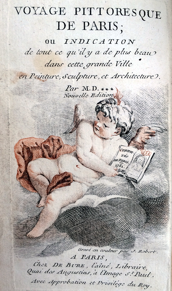 "voyage pittoresque de Paris ou indication de tout ce qu'il y a de plus beau dans cette grande ville en peinture, sculpture & architecture" seconde édition 1752 par monsieur D.